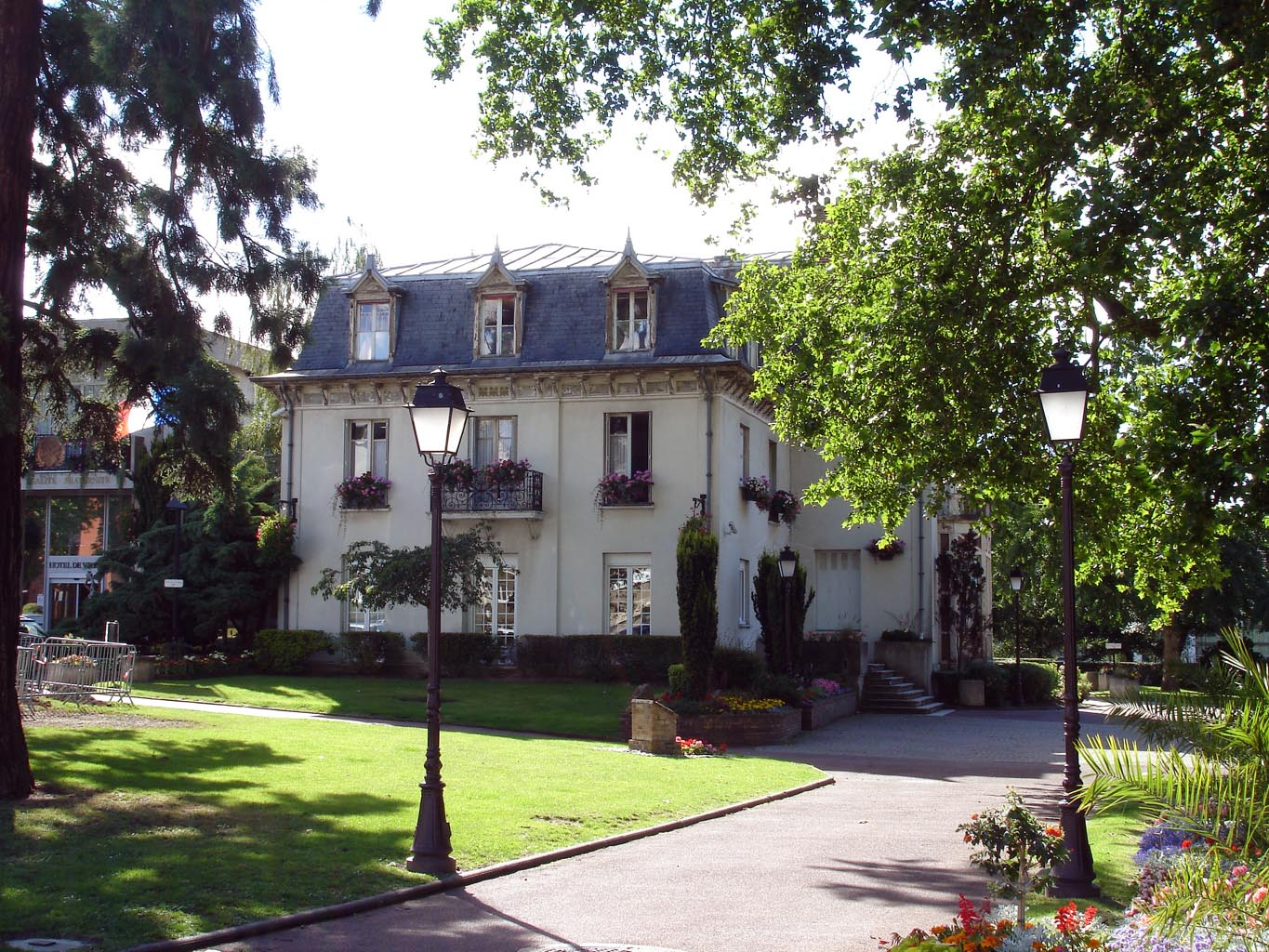 Façade est de l'ancienne mairie de Franconville (Val-d'Oise), France